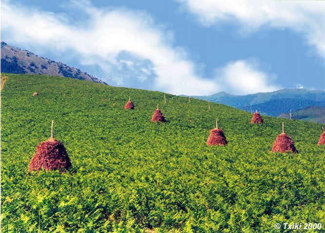 Fougères en conservation sur les hauteurs de Zubieta (Communauté Forale de Navarre-Pyrénées).